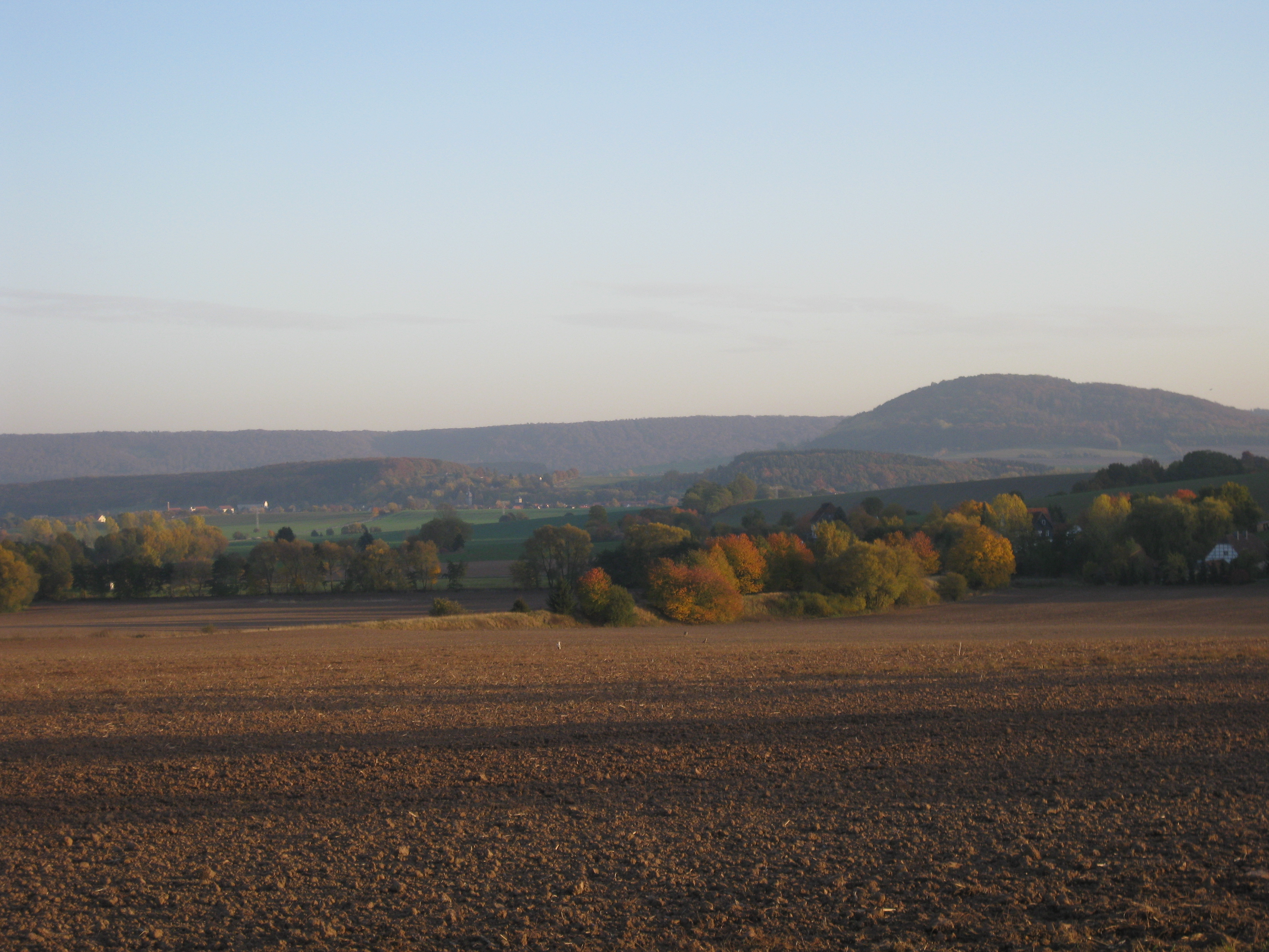 Die bleicheröder Berge von Norden (rechts die Hasenburg)